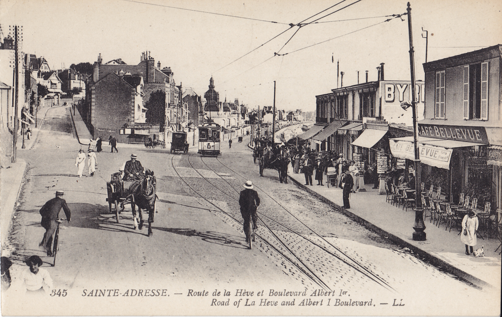 Carte postale ancienne éditée par LL, n°345 : Rue de la Hève et Boulevard Albert 1er